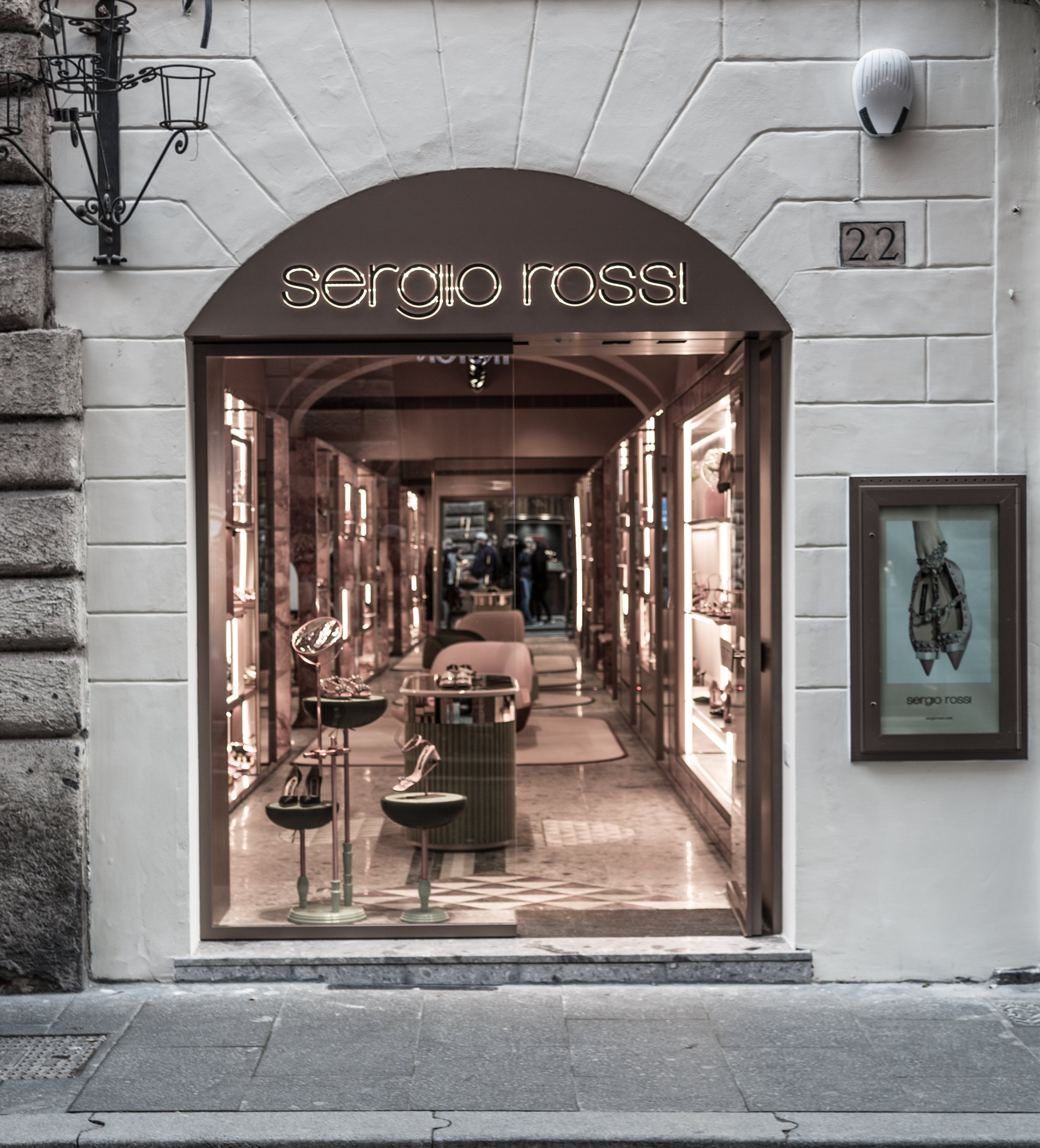 Sergio Rossi Roma Via Condotti esterno